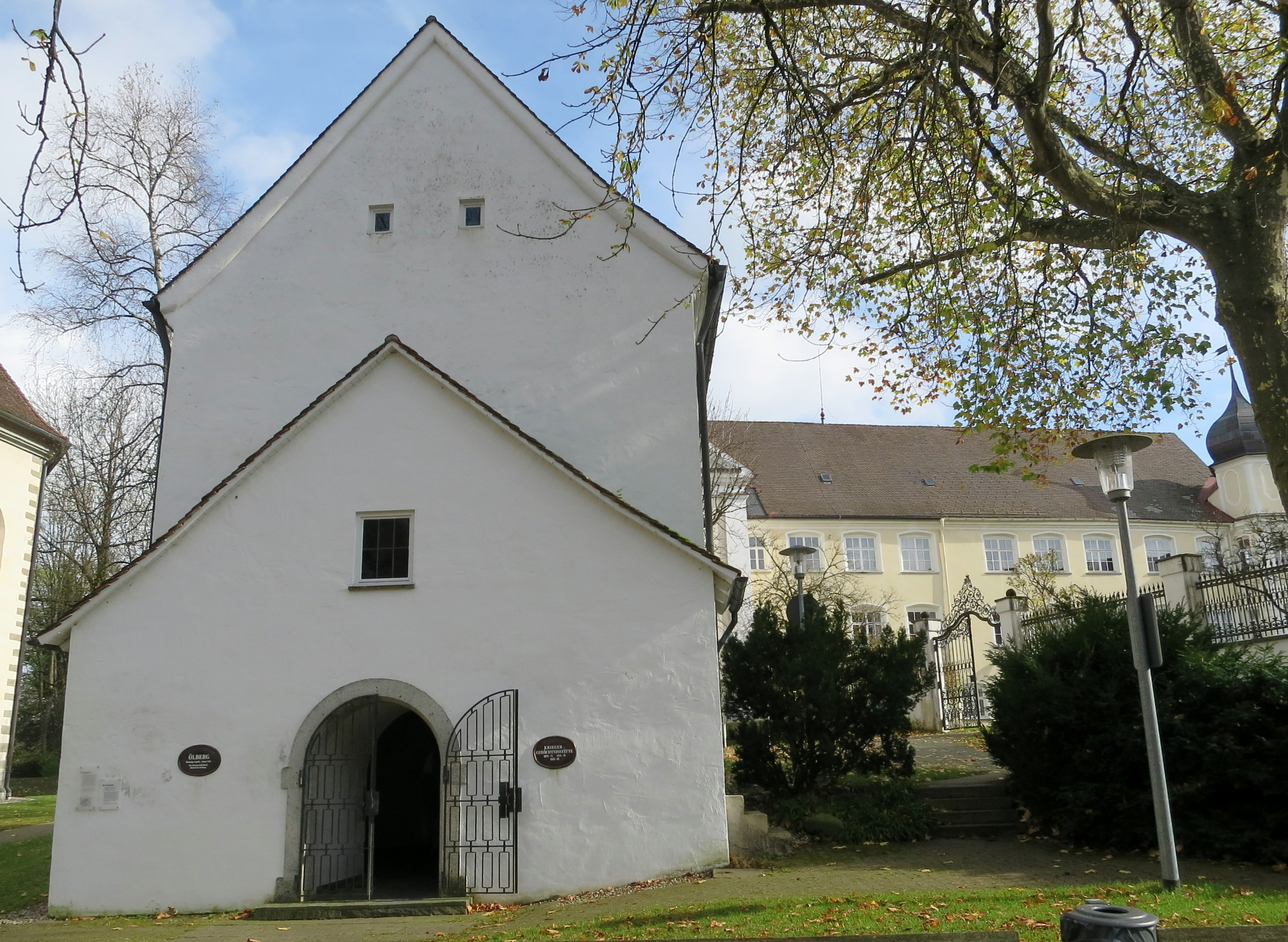 Friedhofskapelle aus dem 15. Jahrhundert